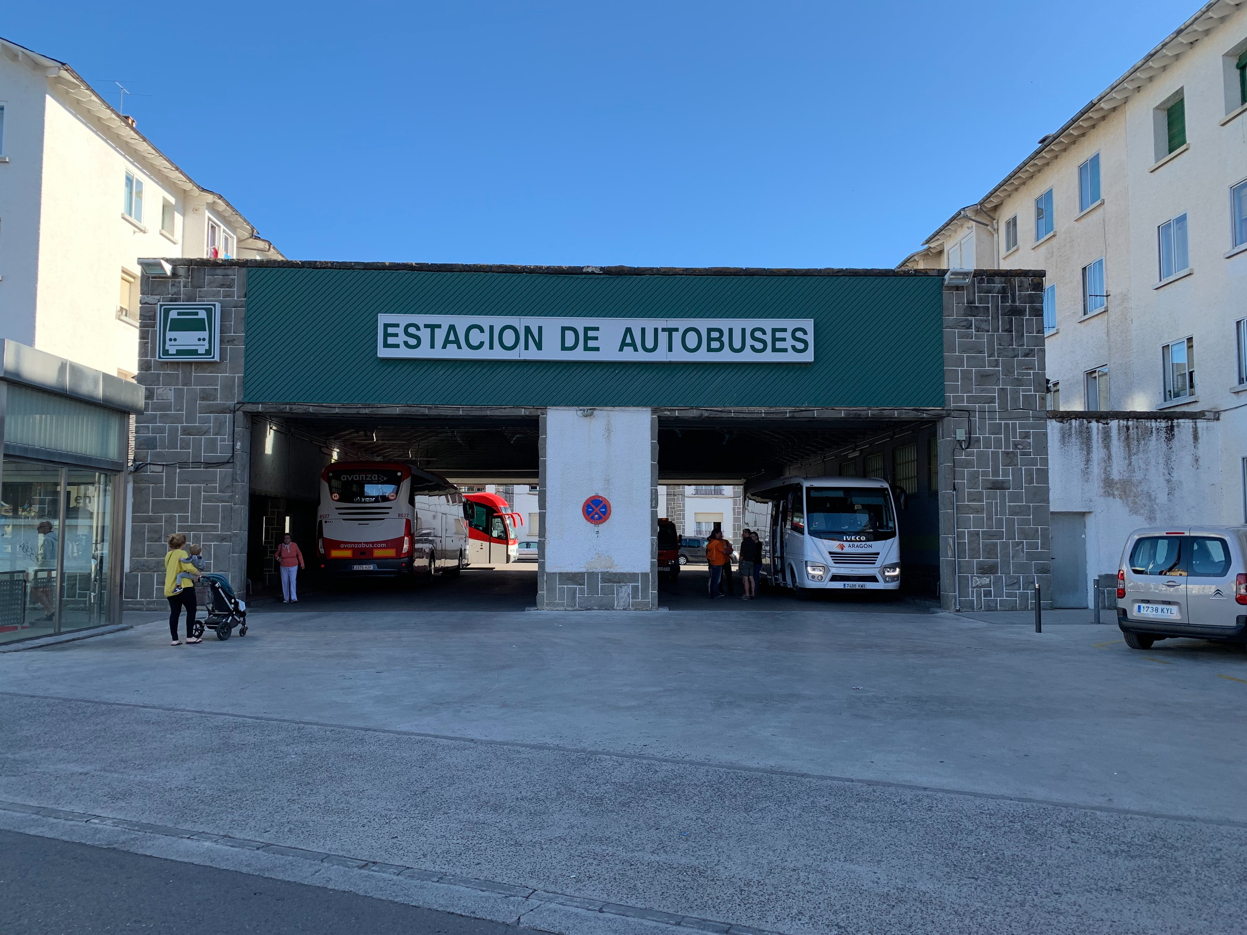 Jaca, España, August 2019